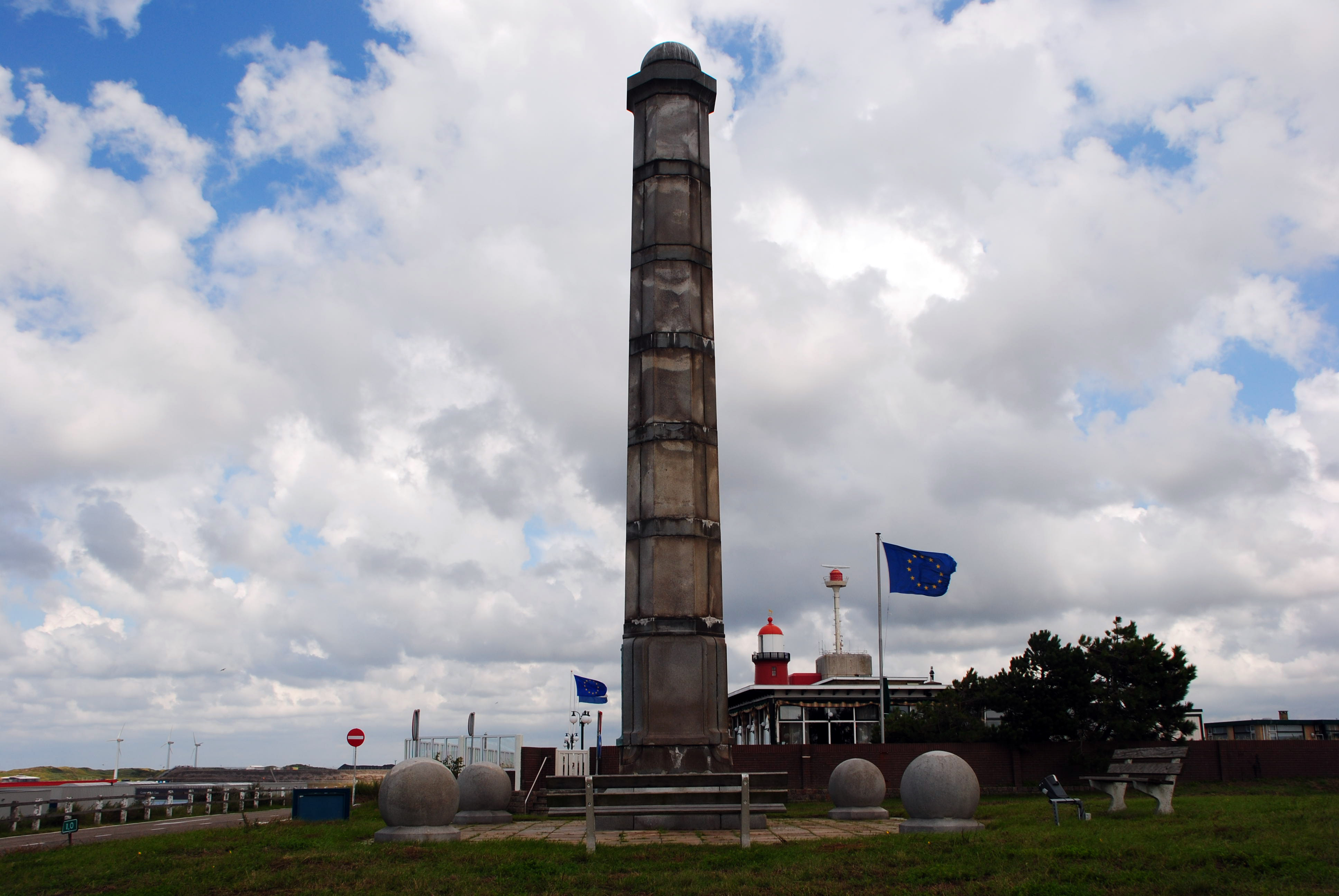 Gedenknaald ter ere van ir. Justus Dirks naast de kleine vuurtoren van IJmuiden, bij de IJmondhaven(Rijksmonument nummer 520709)